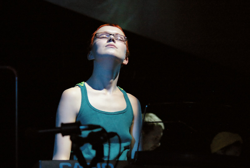 Участник "Небослова"